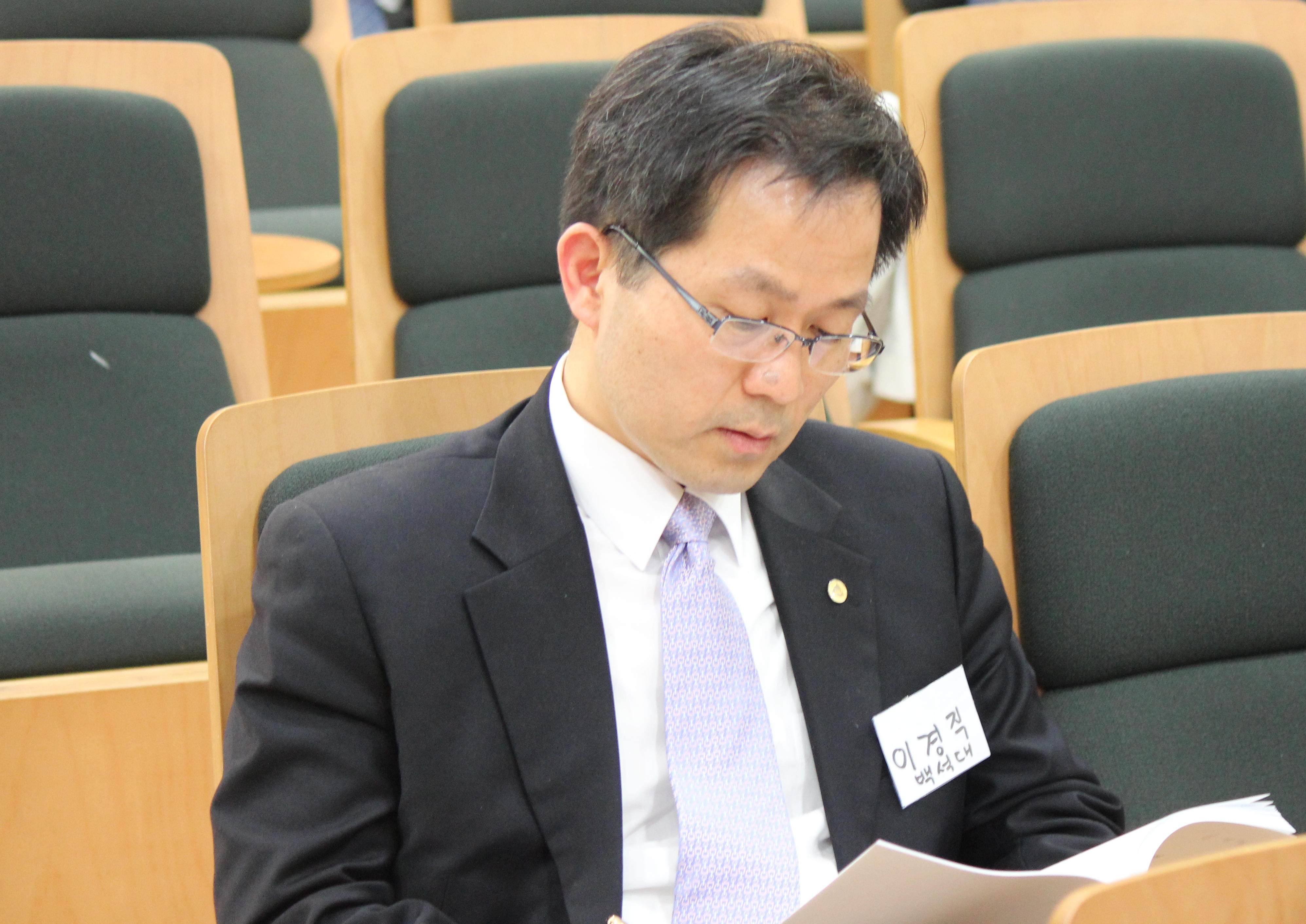 이경직 교수(백석대학교), 성결대학교 2018년 5월 4일